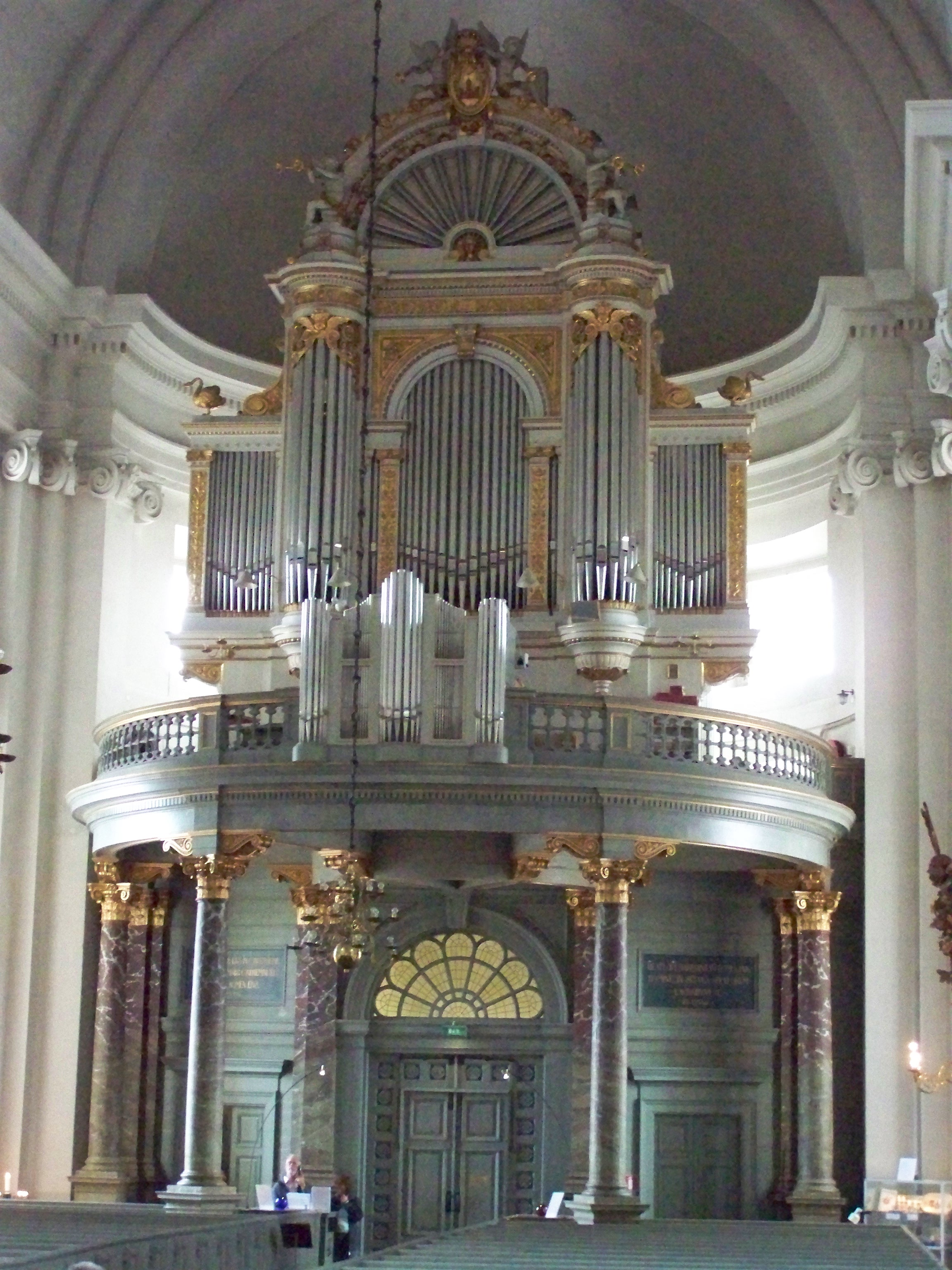 Kalmar,_Dom_Hauptorgel